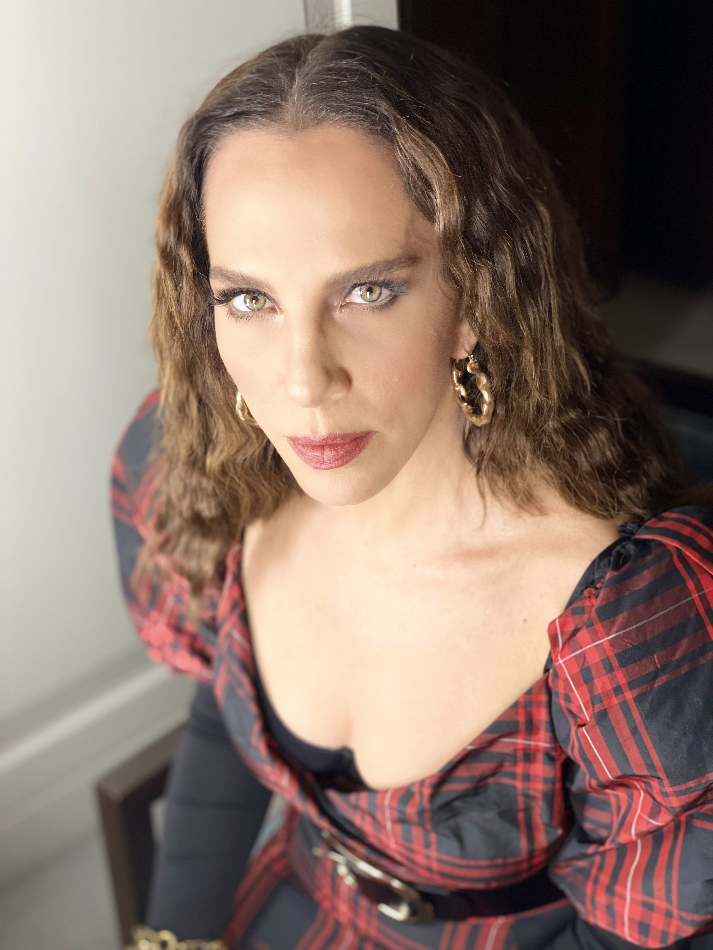 Sertab Erener, 2019